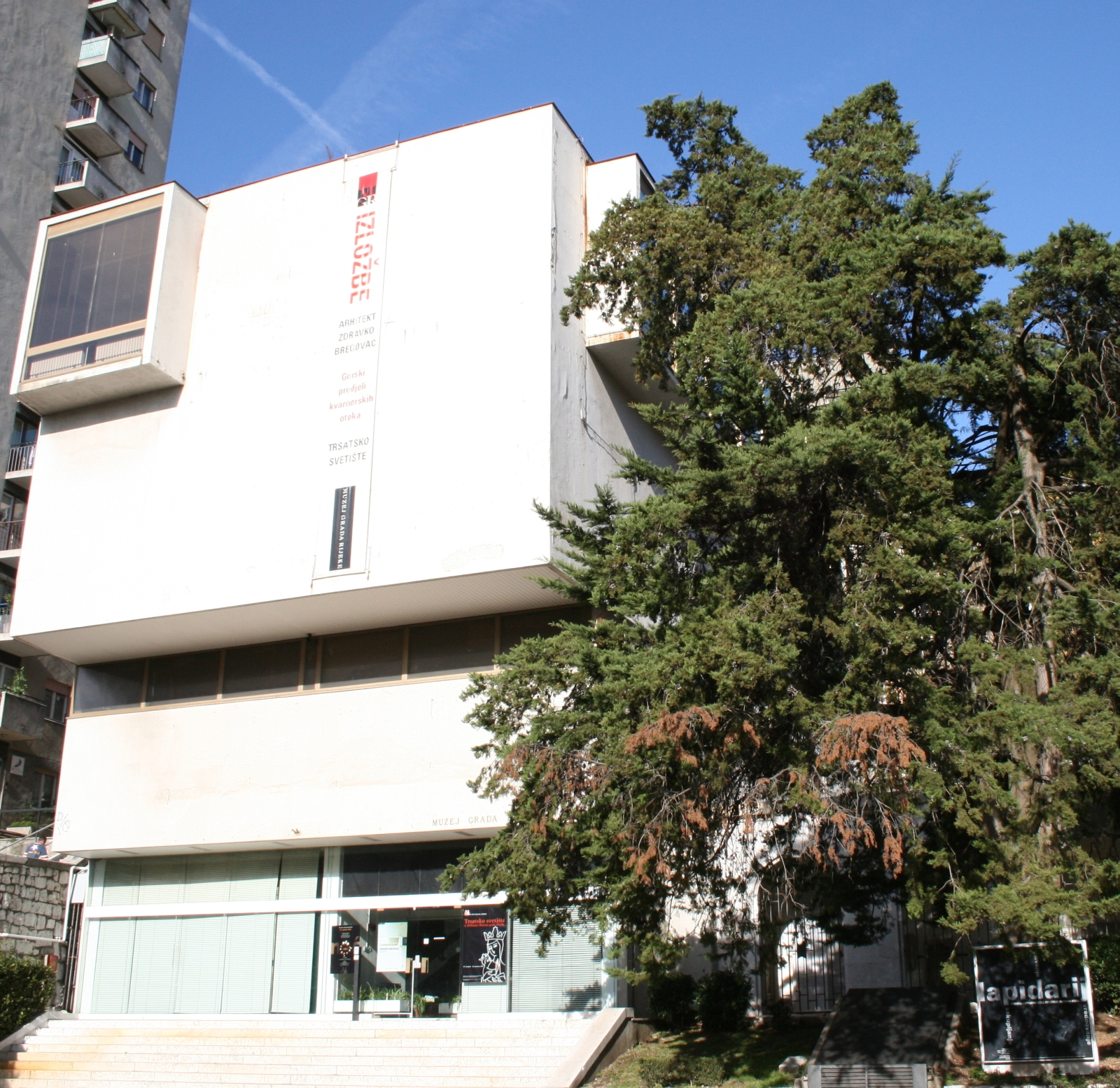 muzej grada Rijeke